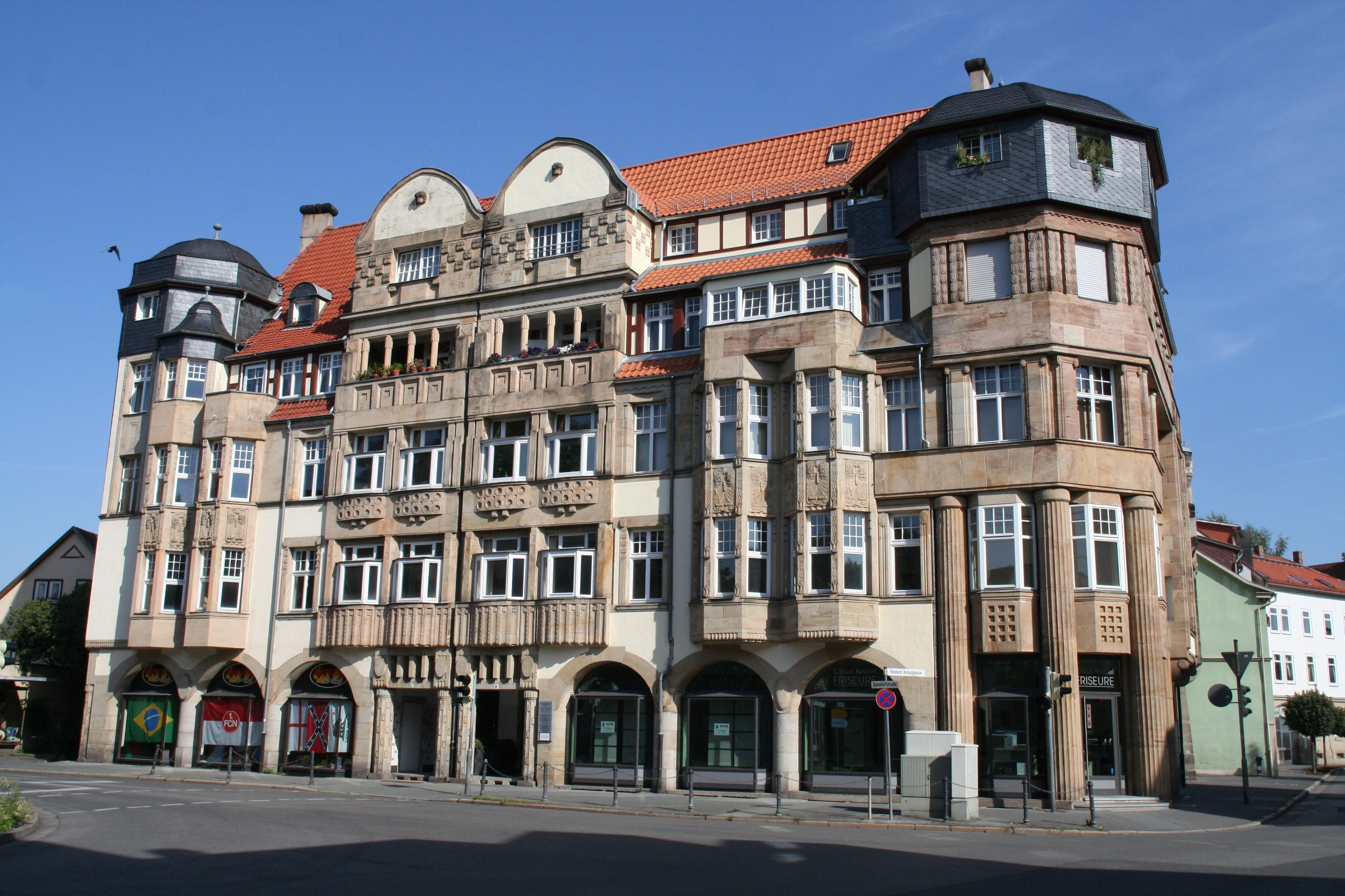 Coburg, Bahnhofstraße 10/12